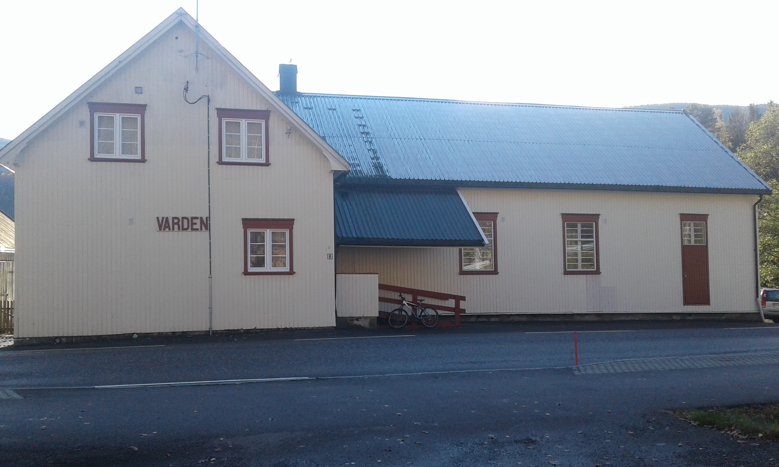 Et samlingslokale i Orevika, Eidsfoss.